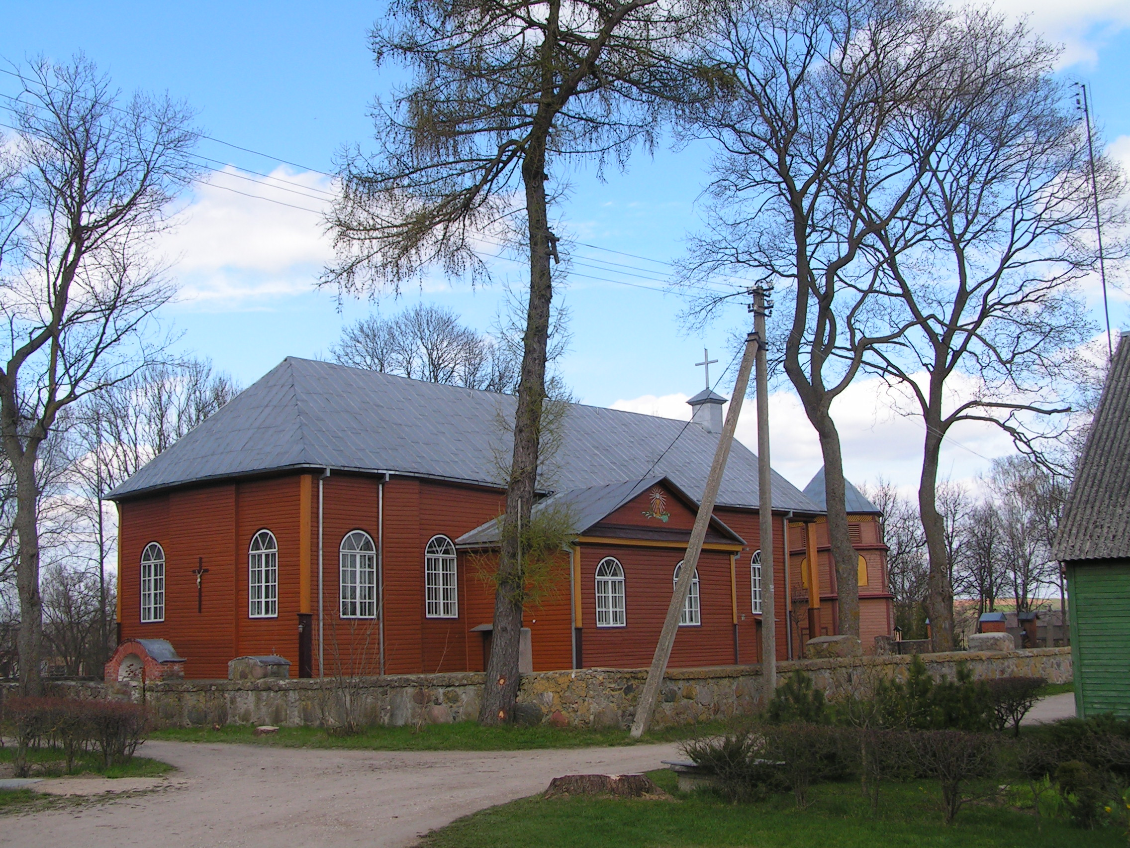 römisch-katholische Kirche (Holzkirche) in Kurkliai, Bezirk Anykščiai, Litauen